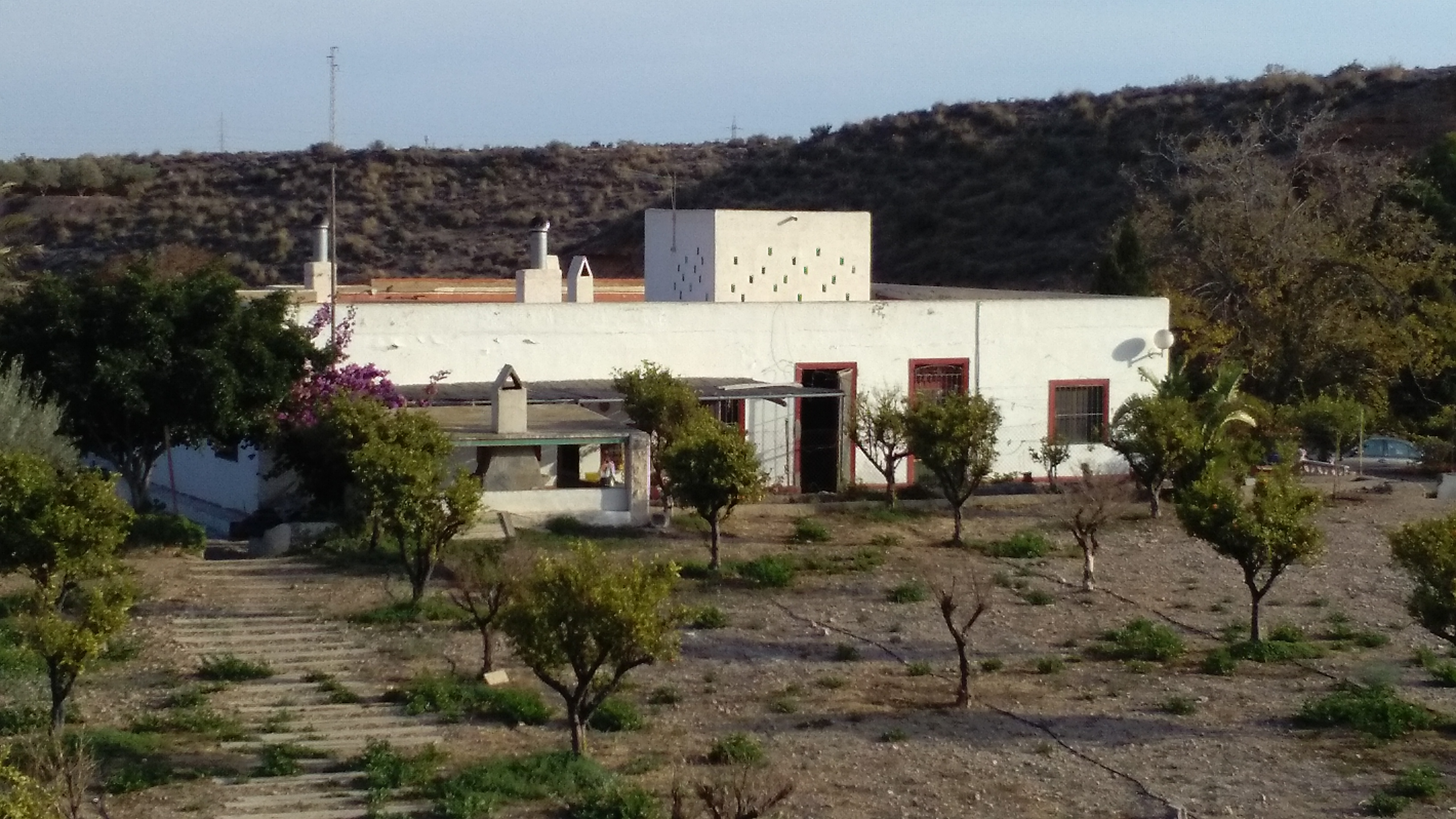 Vista trasera del cortijo donde se planeó y se desarrolló el crimen de Gádor.